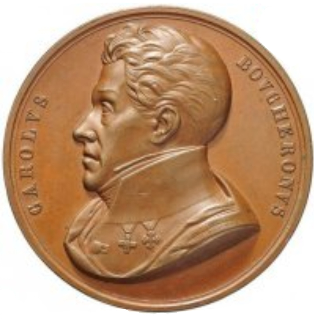 Medaglia con ritratto del filologo Carlo Emanuele Boucheron